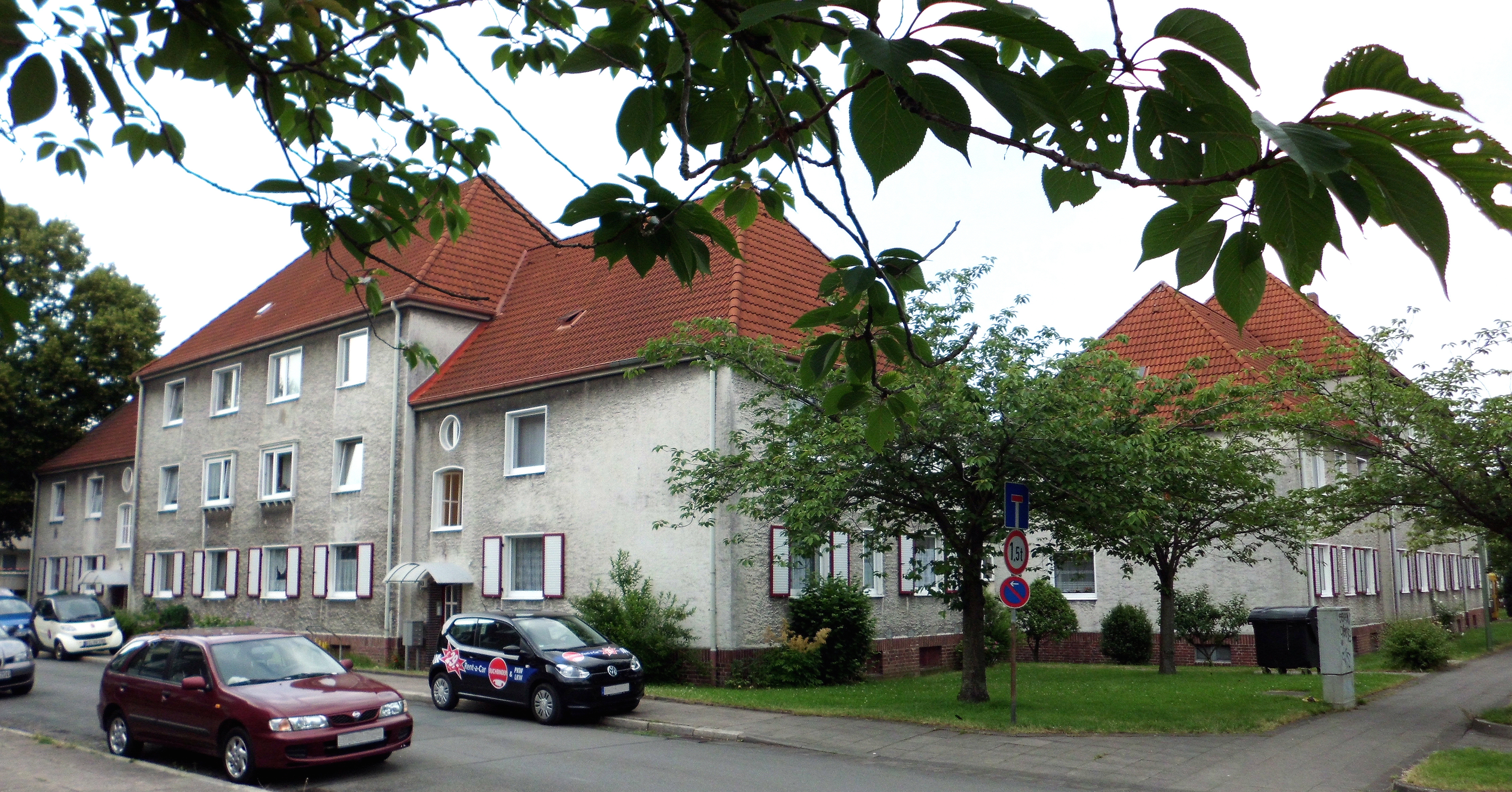 Bielefeld, Baugenossenschaft "Freie Scholle", Siedlungsgebiet auf dem langen Kampe